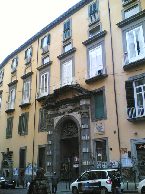 Palazzo monumentale a via Trinità Maggiore